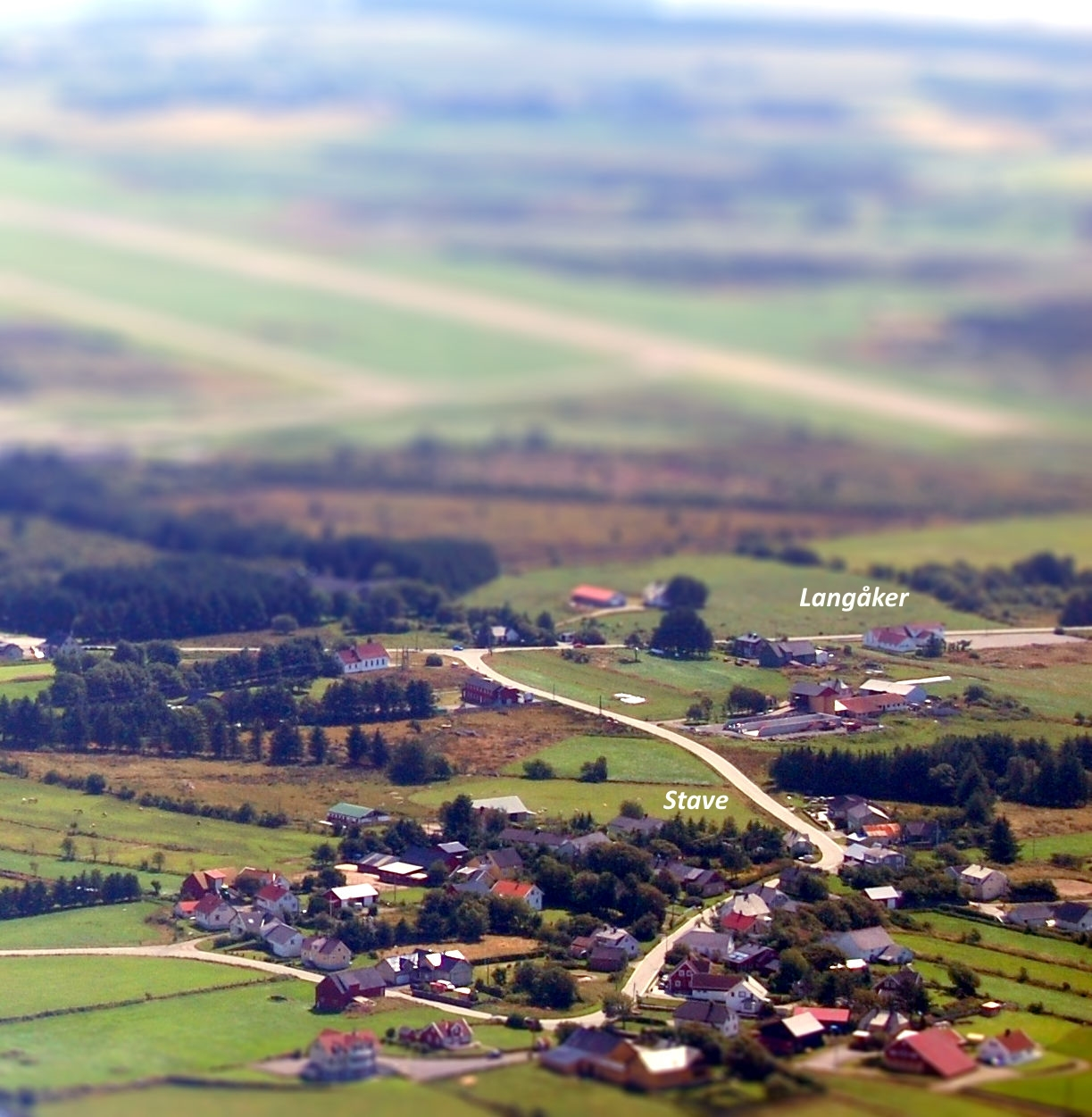 Stave og Langåker, Lista. I bakgrunnen: Farsund lufthavn, Lista Med stedsnavn. Effekt: Tilt-shift